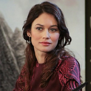 Ольга Куриленко